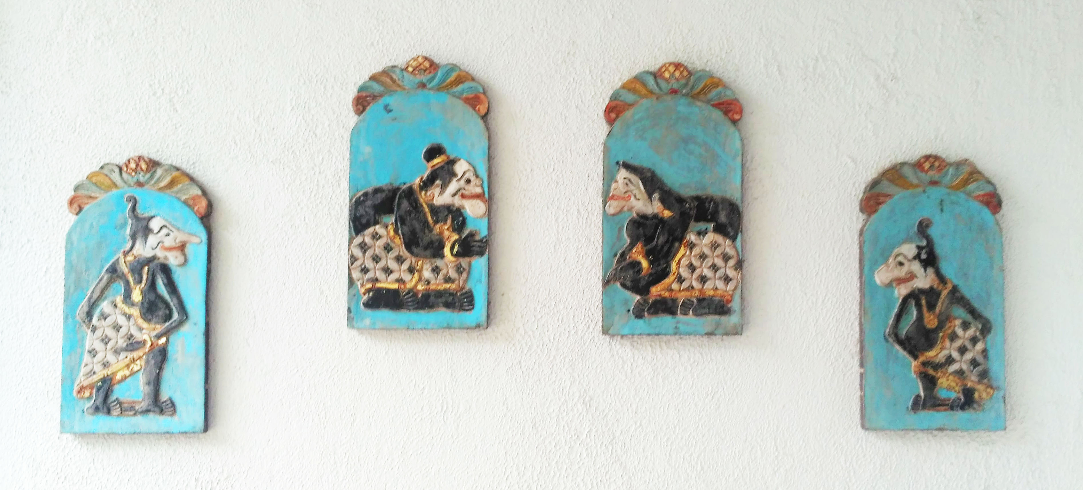 Hiasan kayu Punawakan, dari kiri: Petruk, Bagong, Semar, dan Gareng.